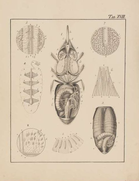 Titel von "Zergliederung der gemeinen Honigbiene" (um 1811, Manuskript für Pastor Hoffmeister zu Wienrode) Karl August Ramdohr 1811